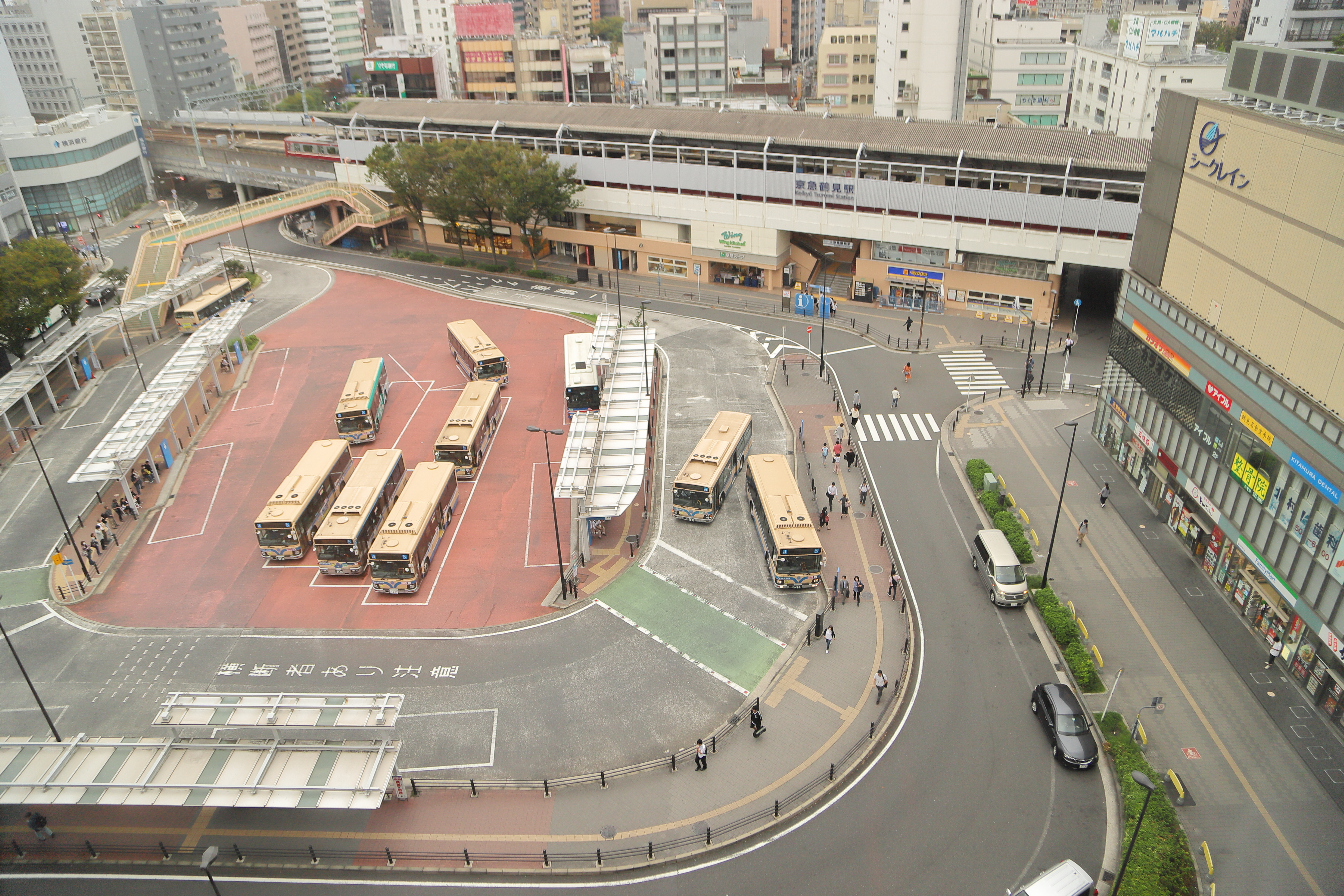 京急鶴見駅・JR鶴見駅バスターミナル。